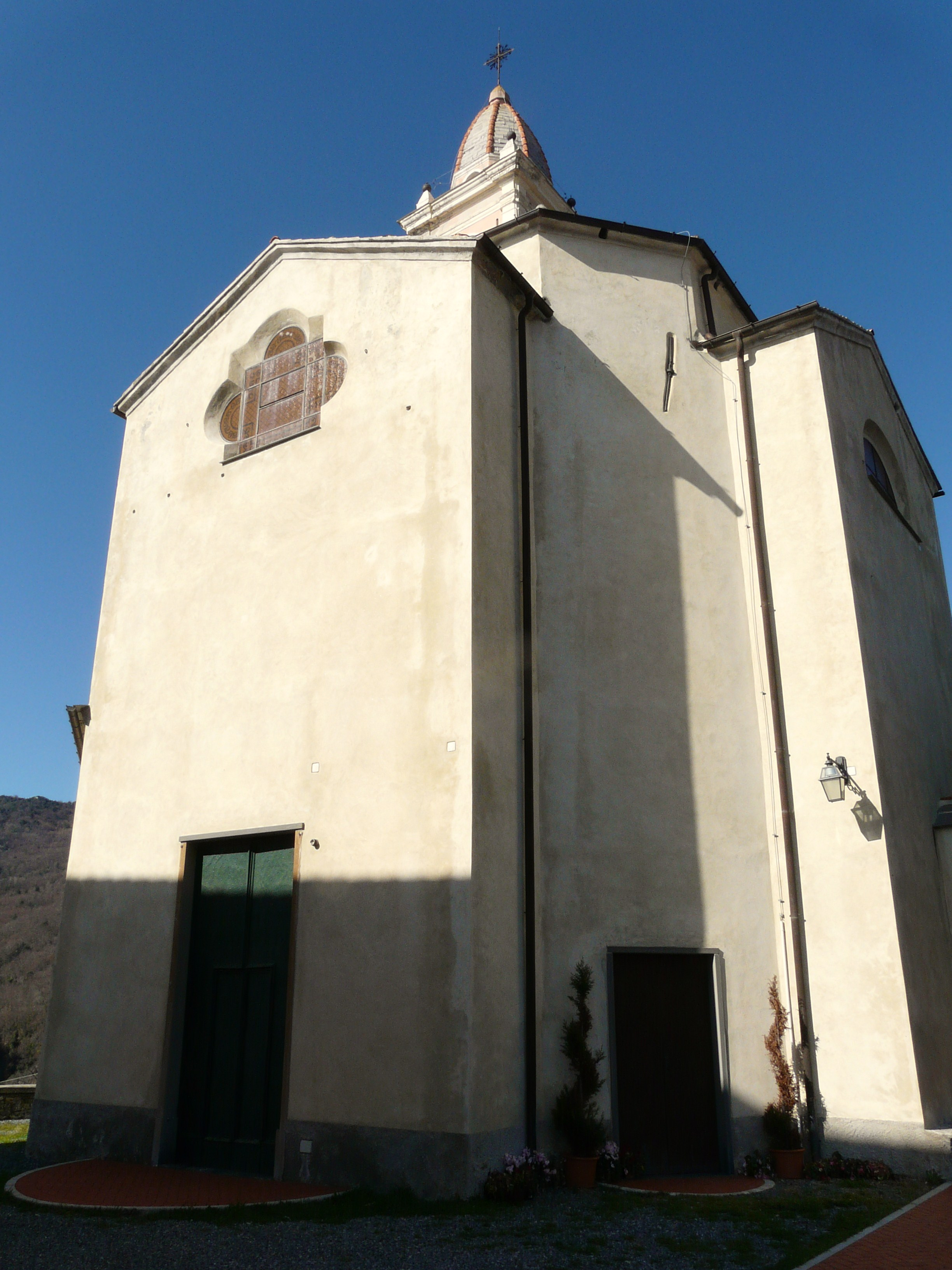 Chiesa dei Santi Filippo Neri e Giorgio, Vezzi Portio, Liguria, Italia